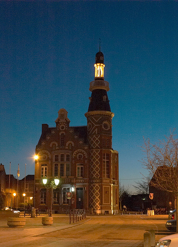 Hotel de ville, construit en 1868 et hébergeant l'Office du Tourisme du Val de Deûle.